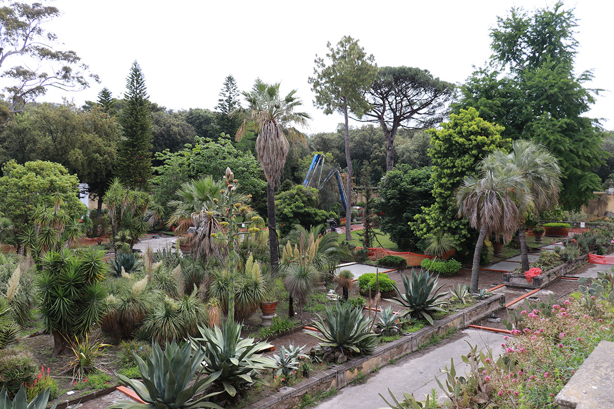 Restauro dell'Orto Botanico di Portici